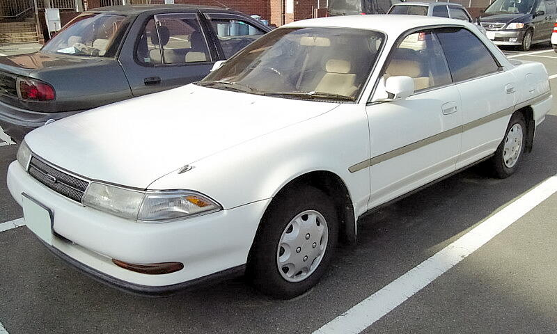 トヨタ・カリーナED（2代目・前期型）